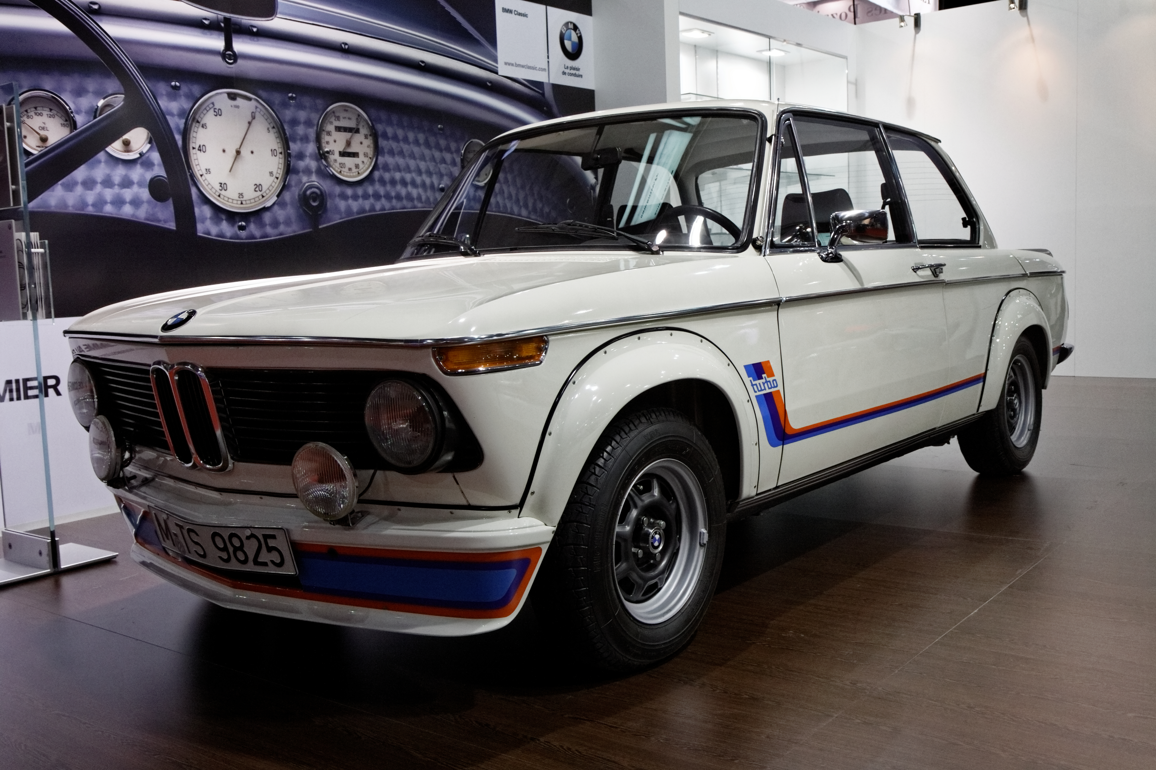 BMW 2002 Turbo